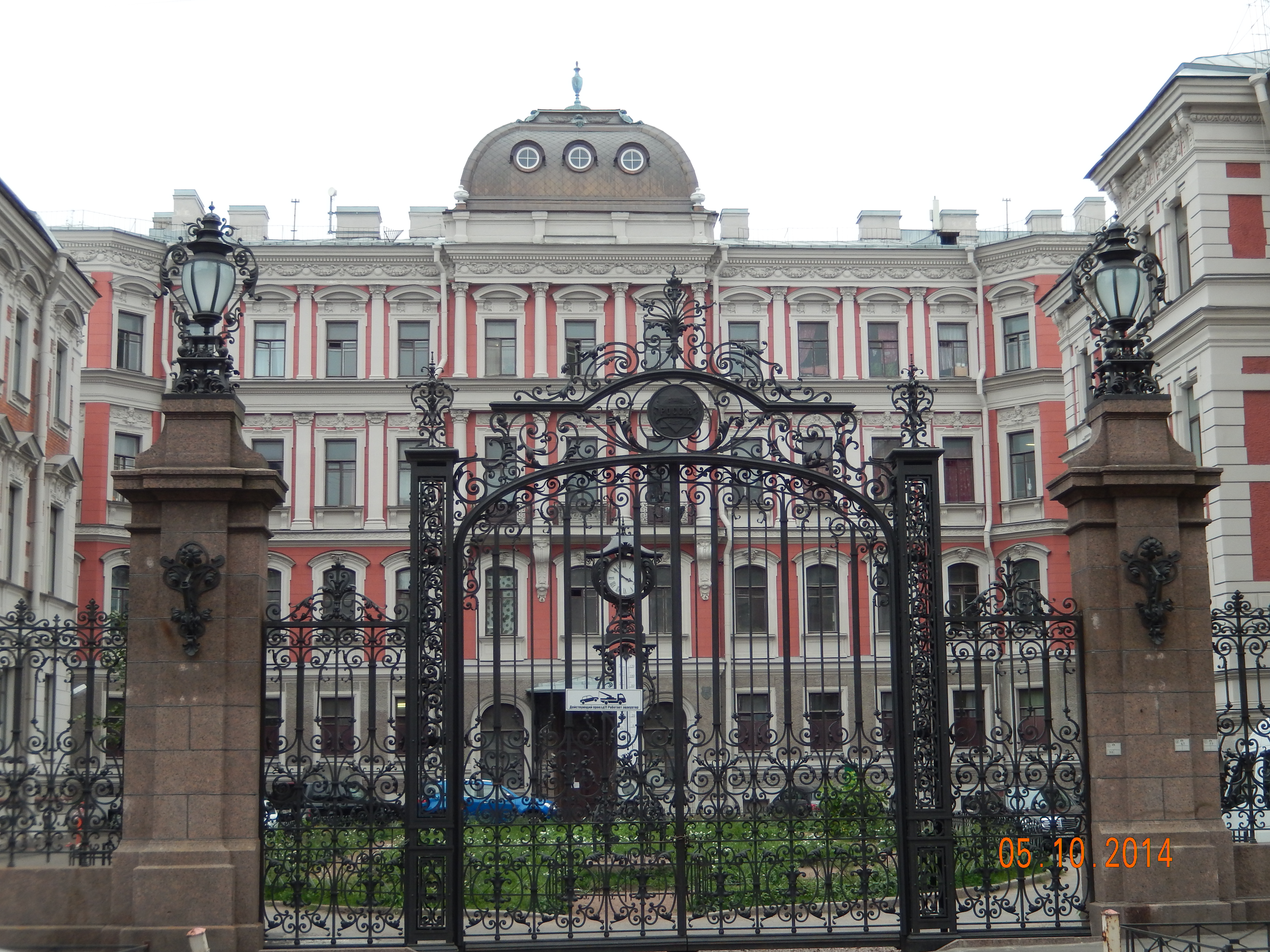 Главное здание (Санкт-Петербург и Лен.область, Санкт-Петербург, моховая улица, 27, 29)